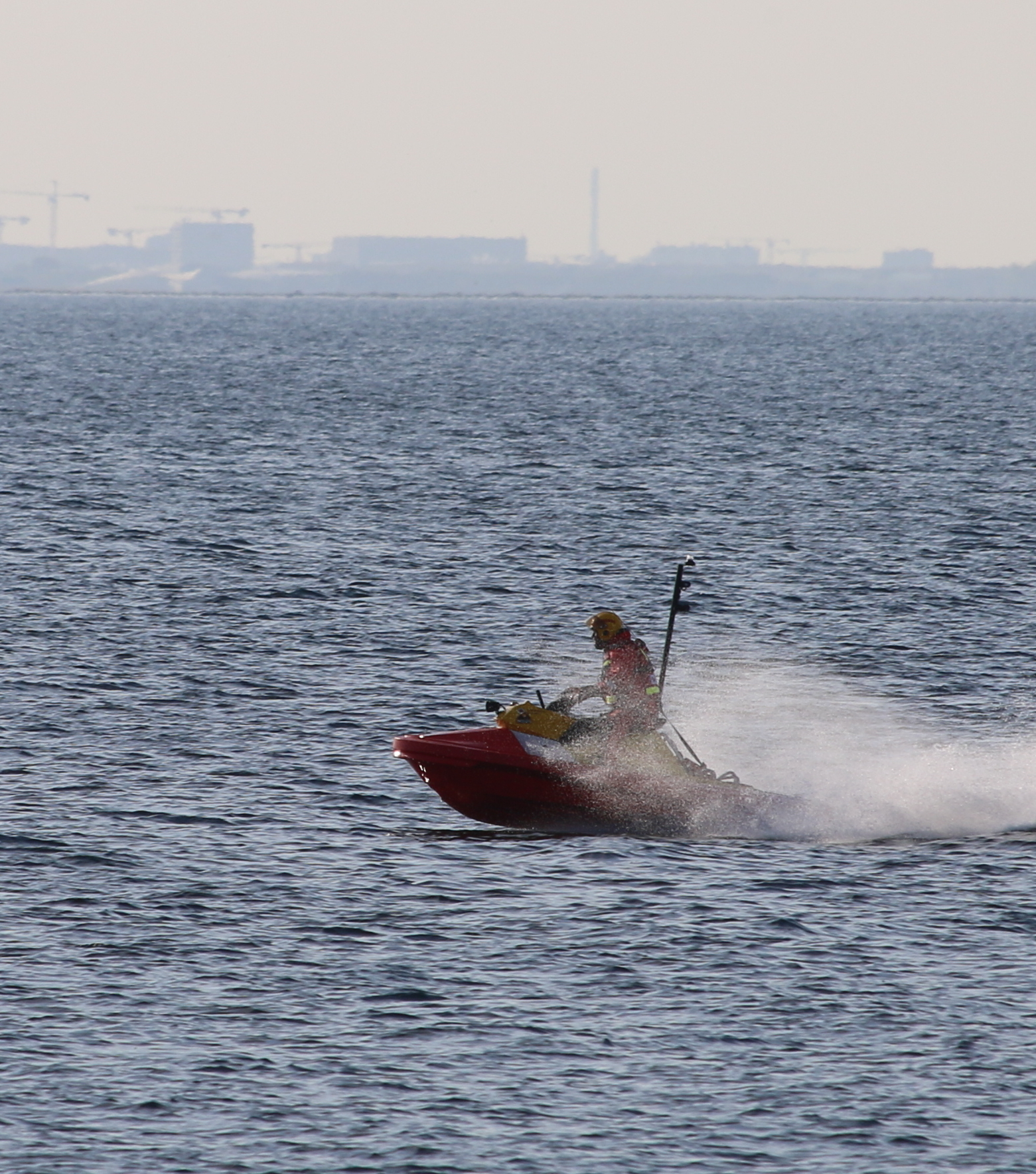 Rescue runner i Öresund